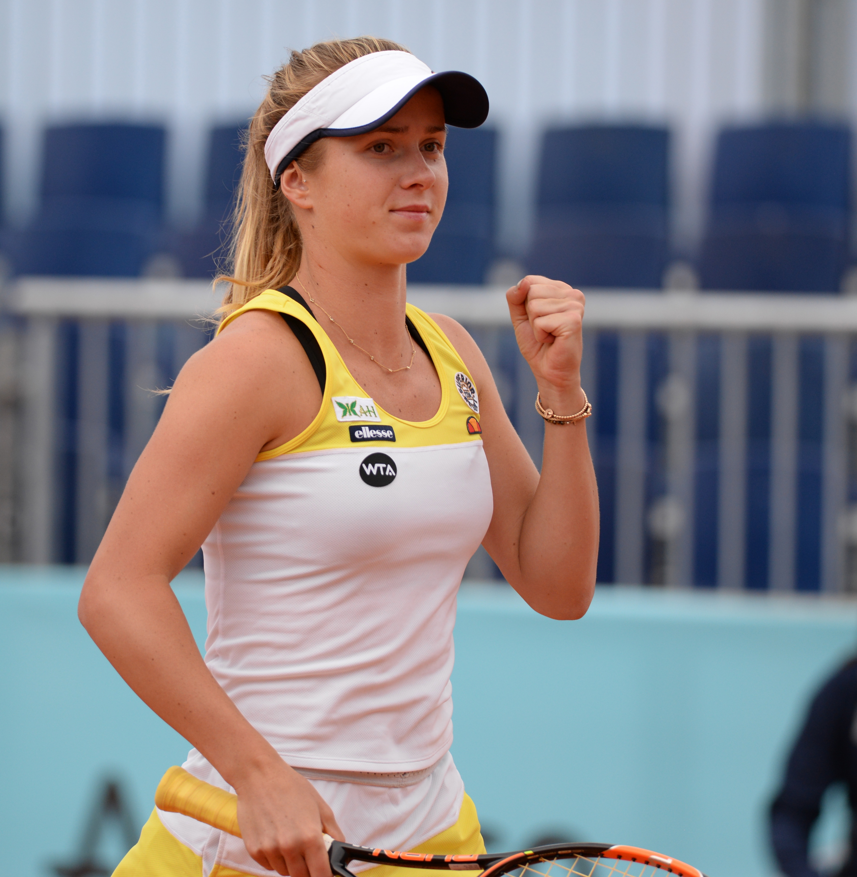 Elina Svitolina